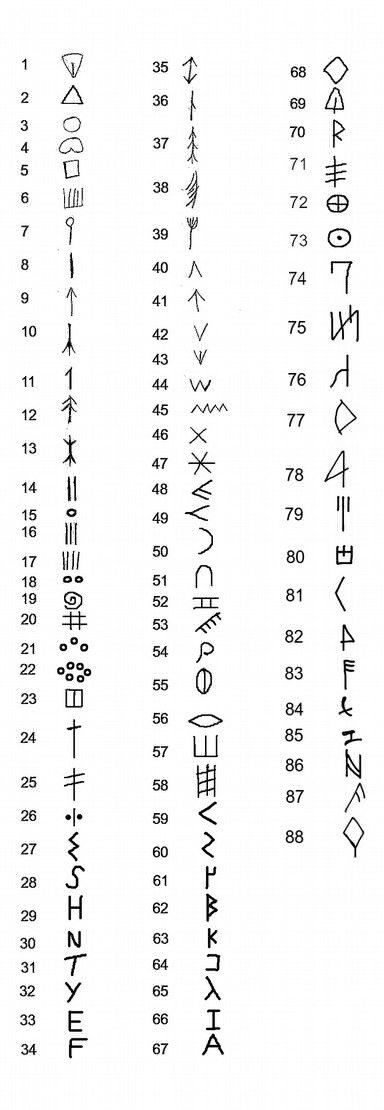 Signario de la Escritura Lineal Paleolítica (ELPA), compilado tras veinte años de investigaciones y catalogación de los registros de Arte Rupestre y grafismo usados durante el Paleolítico Superior. Esta imagen puede compartirse de modo libre. El autor (Georgeos Díaz-Montexano, 1994) la dispone bajo licencia Creative Commons 3.0 ( de modo que cualquiera puede utilizarla, copiarla, modificarla y comercializarla.